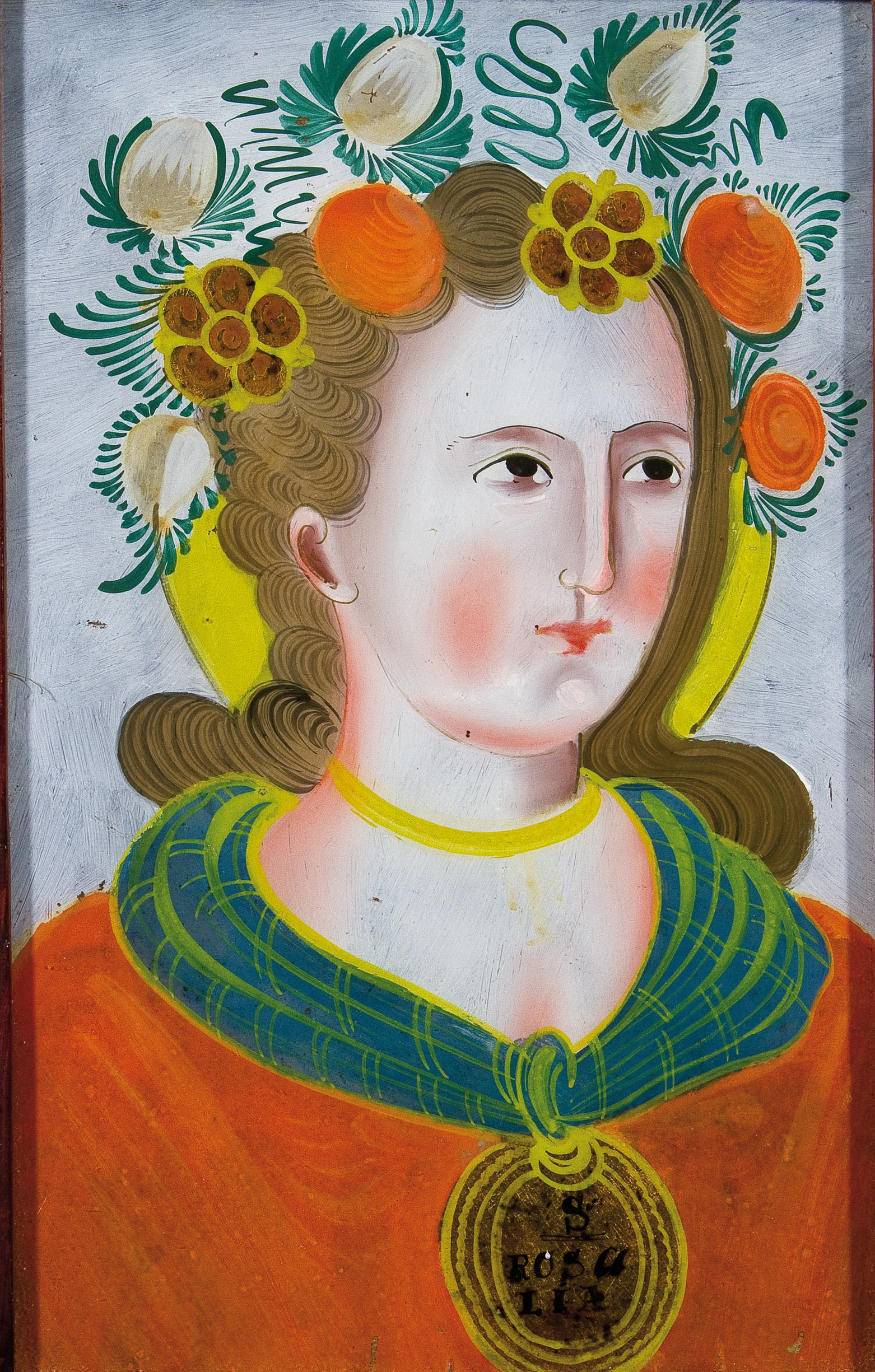 Hl. Rosalia (Sinibaldi), Hinterglasbild, 32 x 21,5 cm; Kaiserswalde (Schlesien), 3. Viertel 19. Jahrhundert